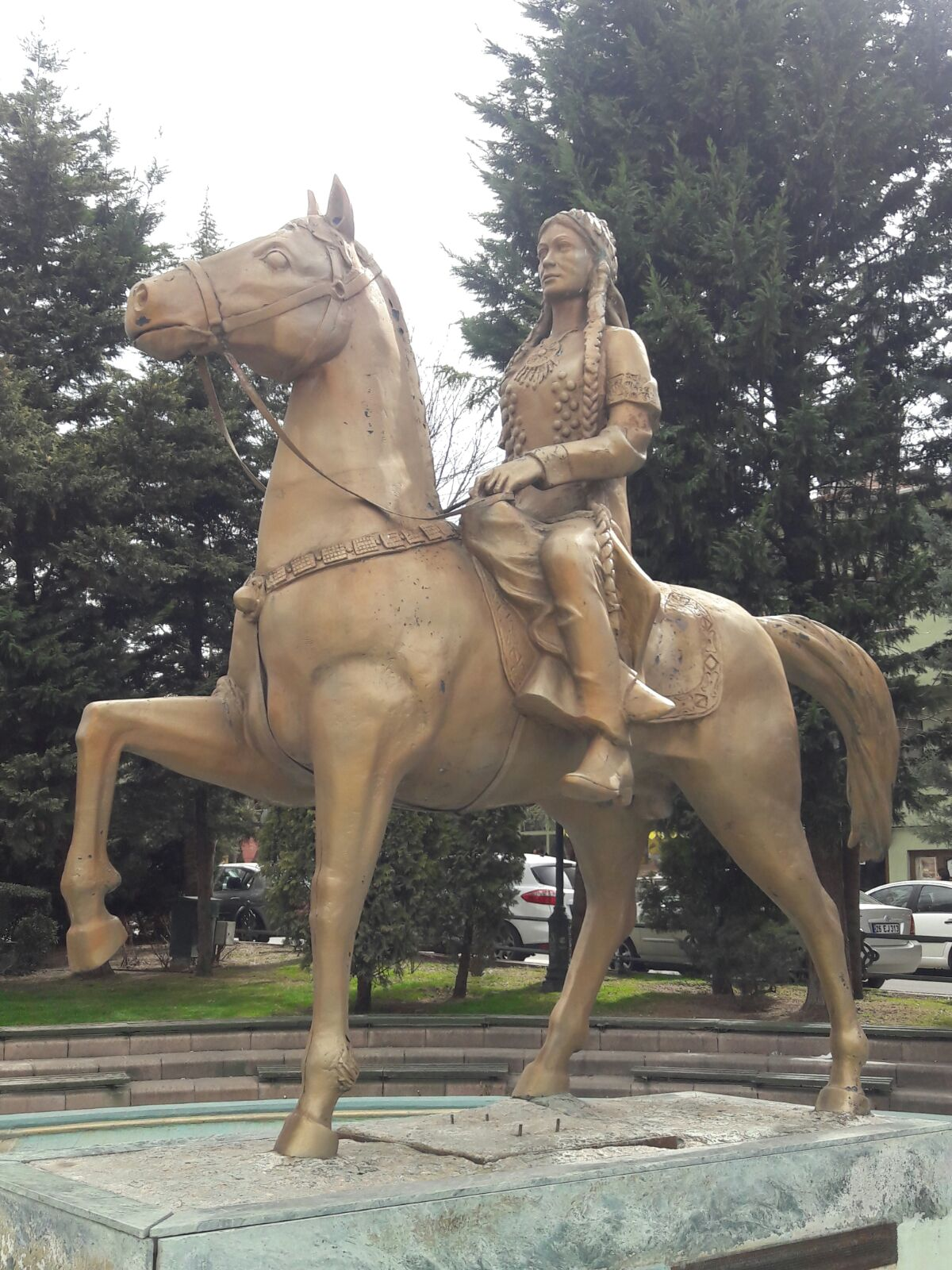 eskişehirde malhatun heykeli